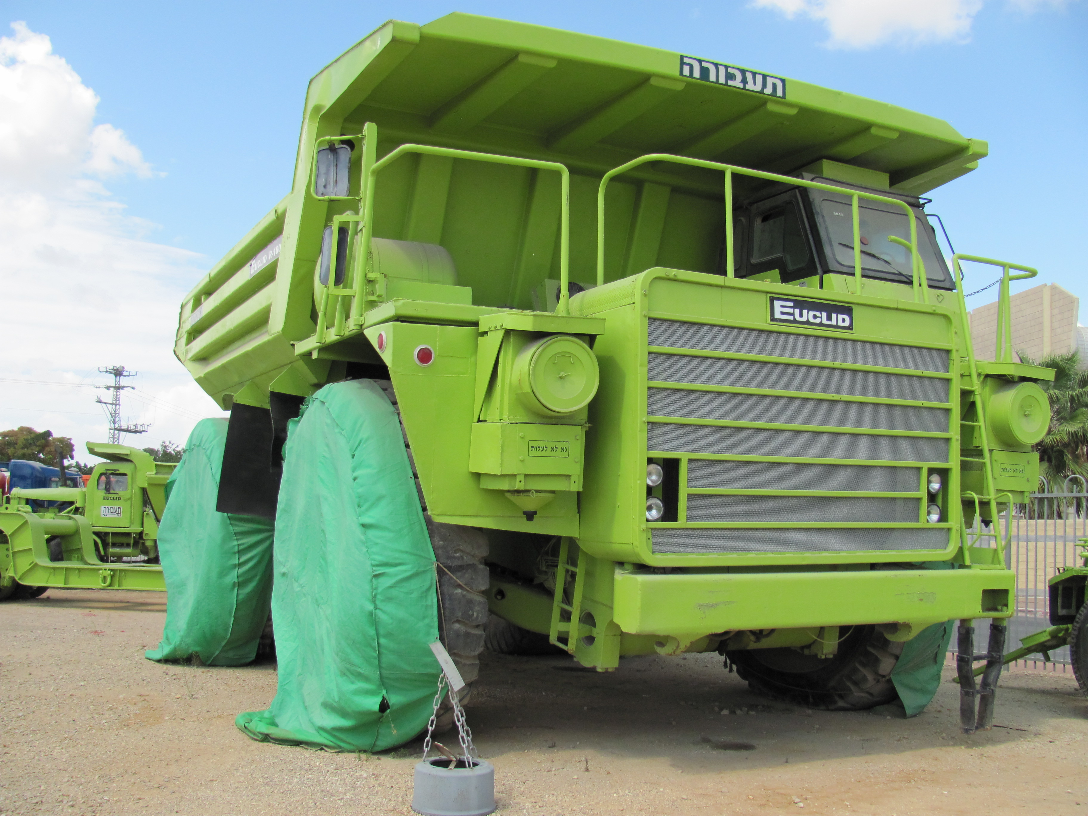 מוצג במוזאון המשאיות ברמלה